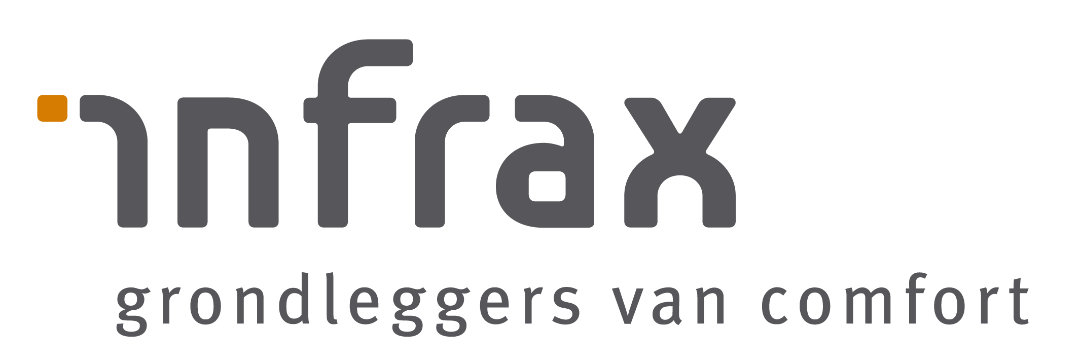 Infrax logo